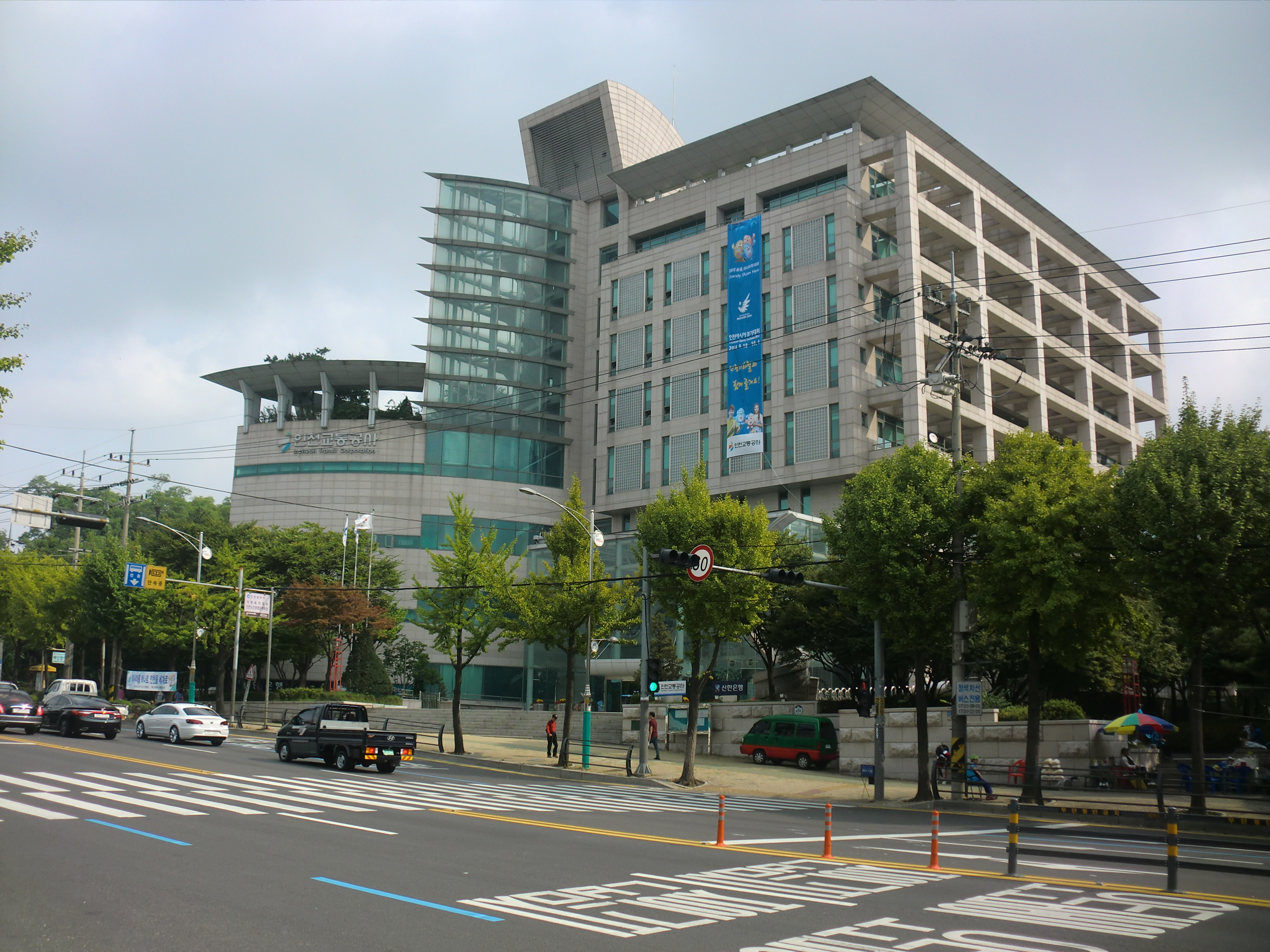 인천광역시 남동구에 있는 인천교통공사